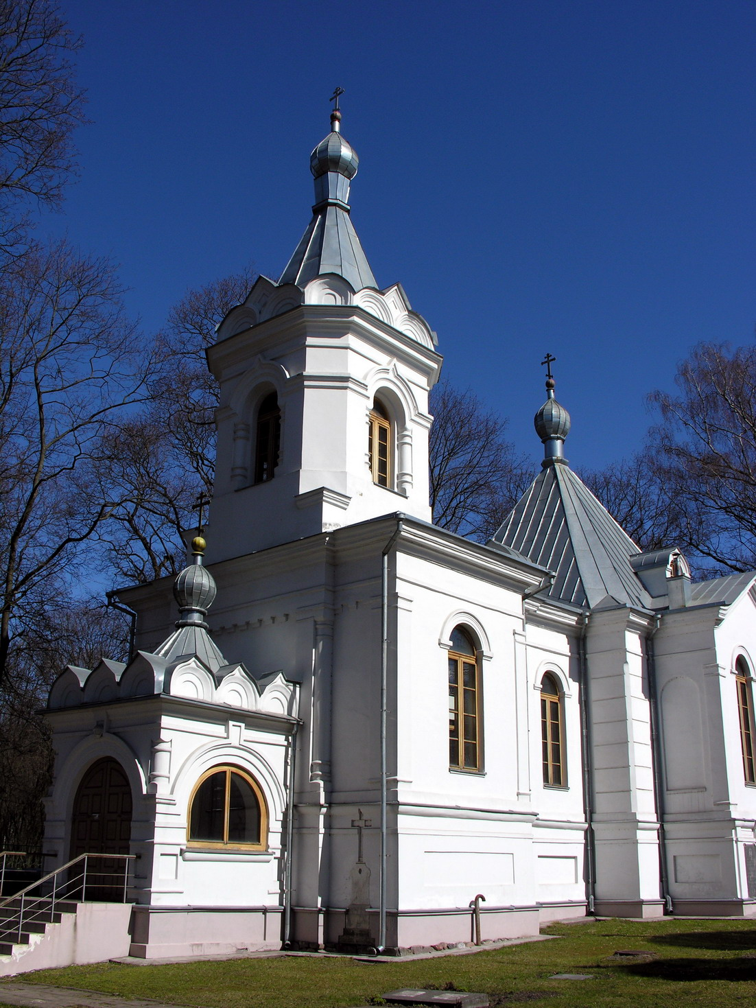 Kauno Kristaus Prisikėlimo cerkvė.